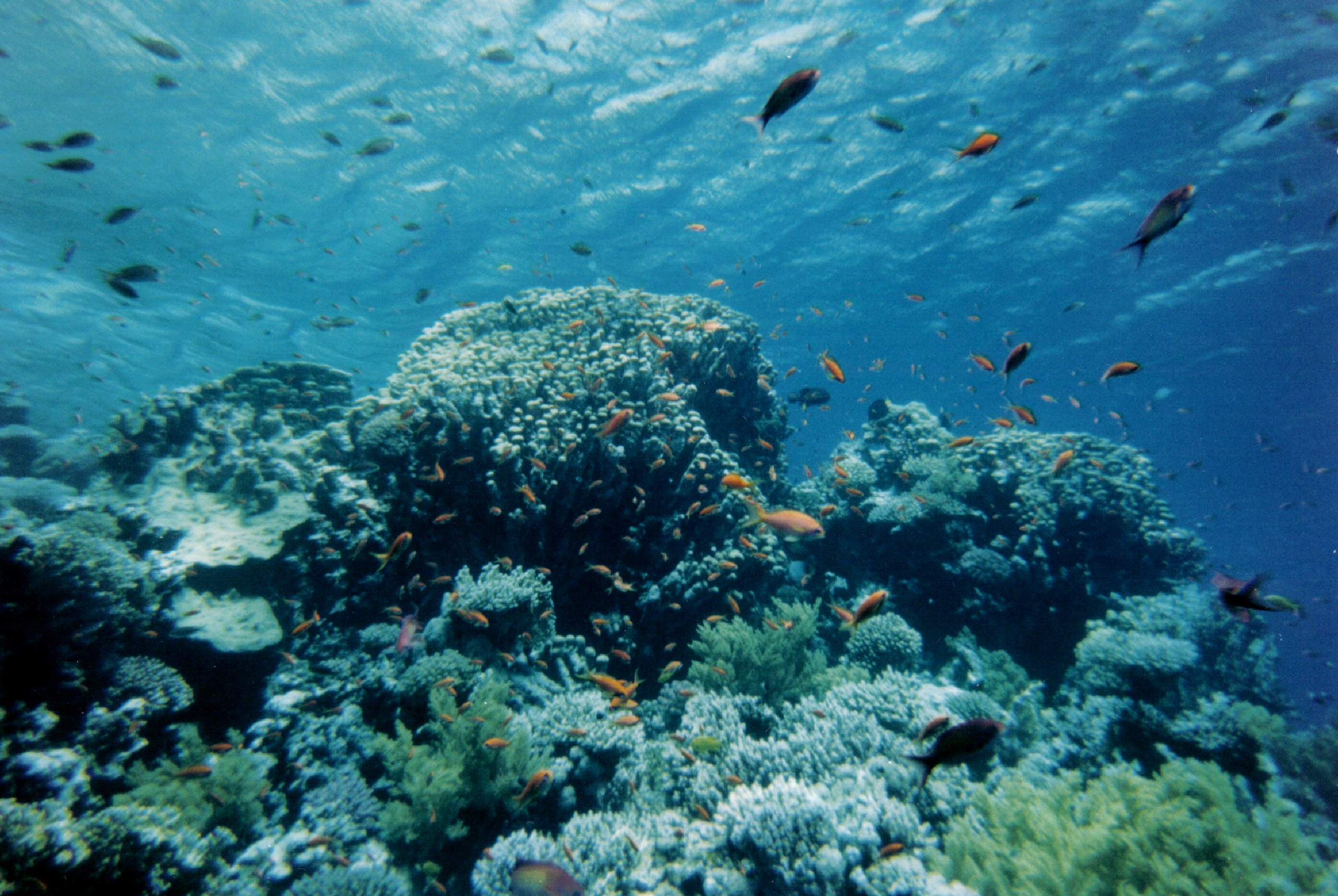 Riff rotes Meer